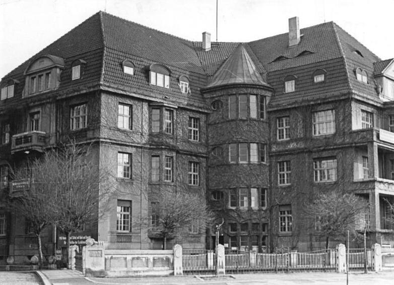 Zentralbild Illner Kno-Noa 18.3.1953. Die Universität Leipzig im Karl-Marx-Jahr 1953. Die Universität Leipzig hat im Karl-Marx-Jahr am 5. Mai zu Ehren des größten Sohnes der Deutschen Nation den Namen "Karl-Marx-Universität" erhalten - Gebäude der Universität. UBz: Das Institut für Publizistik und Zeitungswissenschaft der Philosphischen Fakultät der Universität Leipzig.